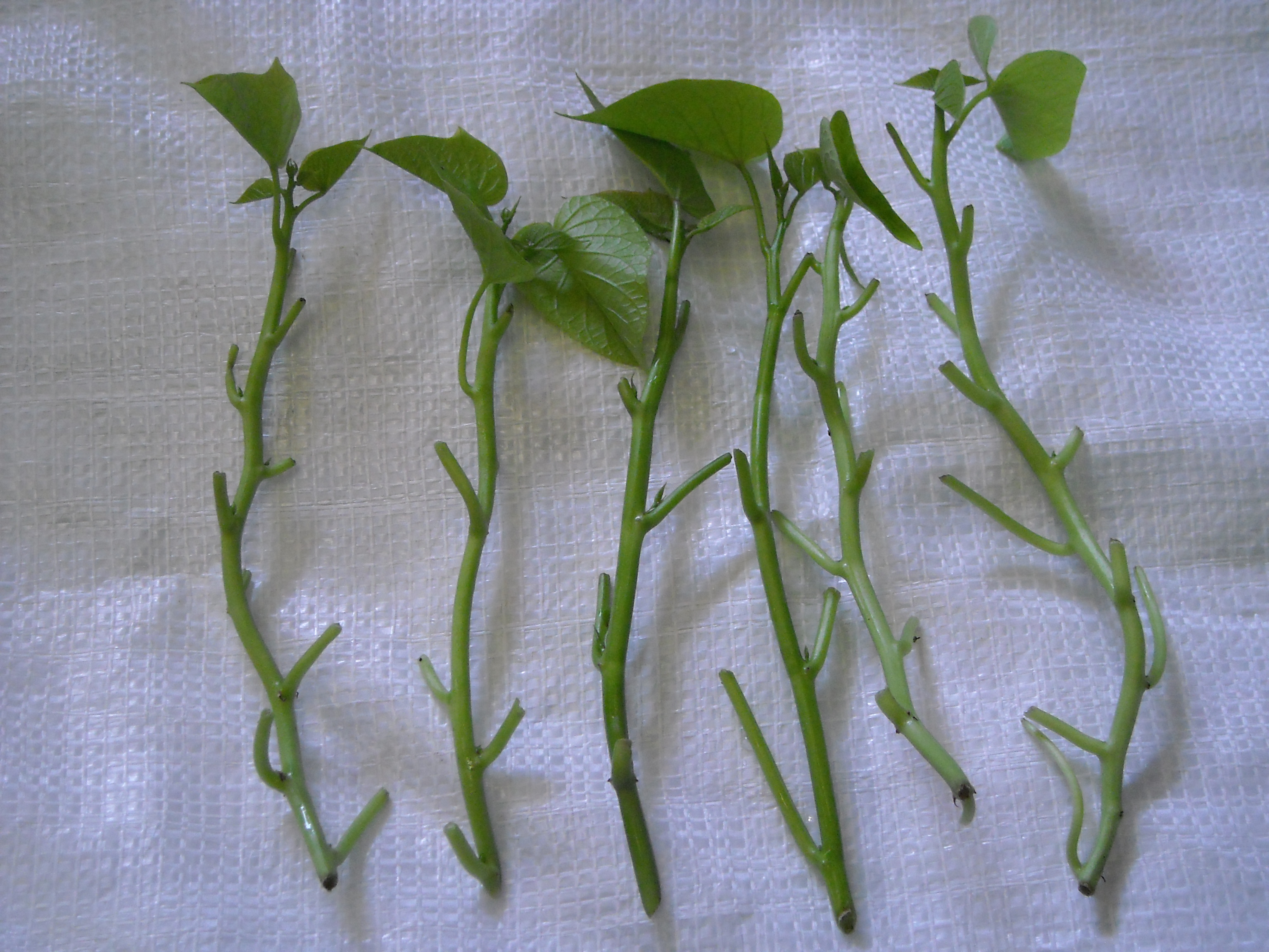 準備用以扦插的番薯藤